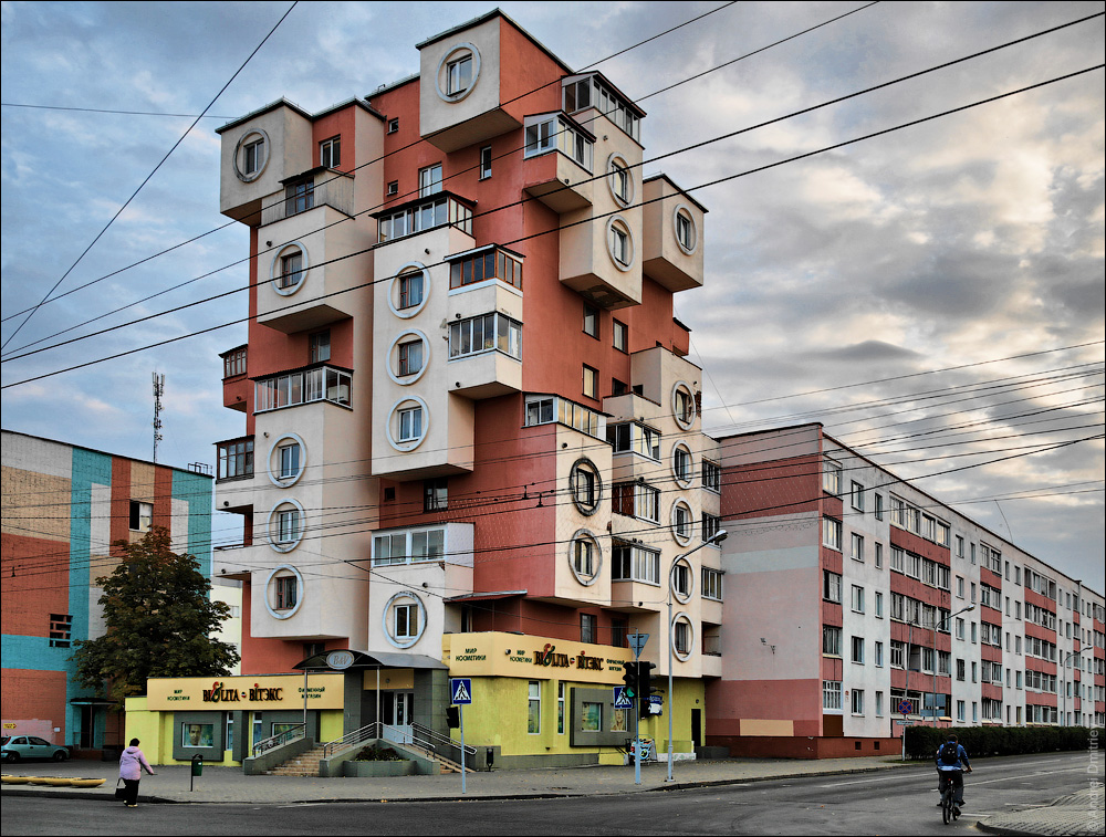 Бабруйскія краявіды